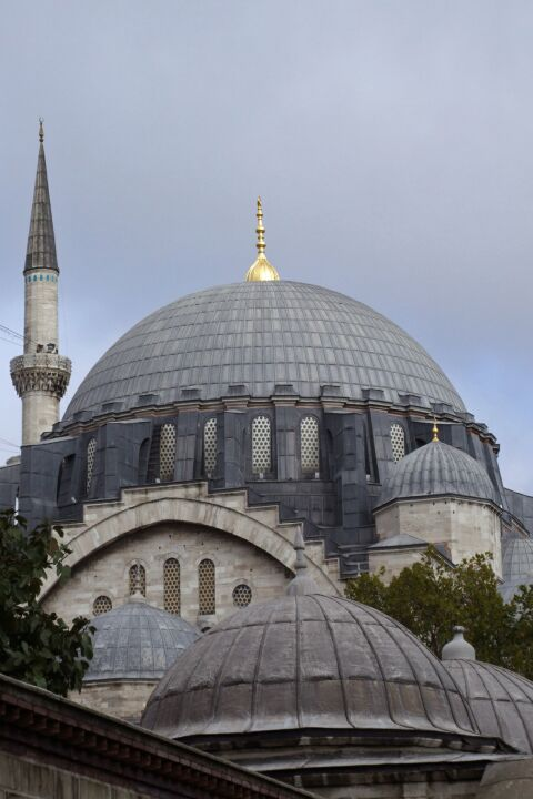 Suleymaniye Mosque